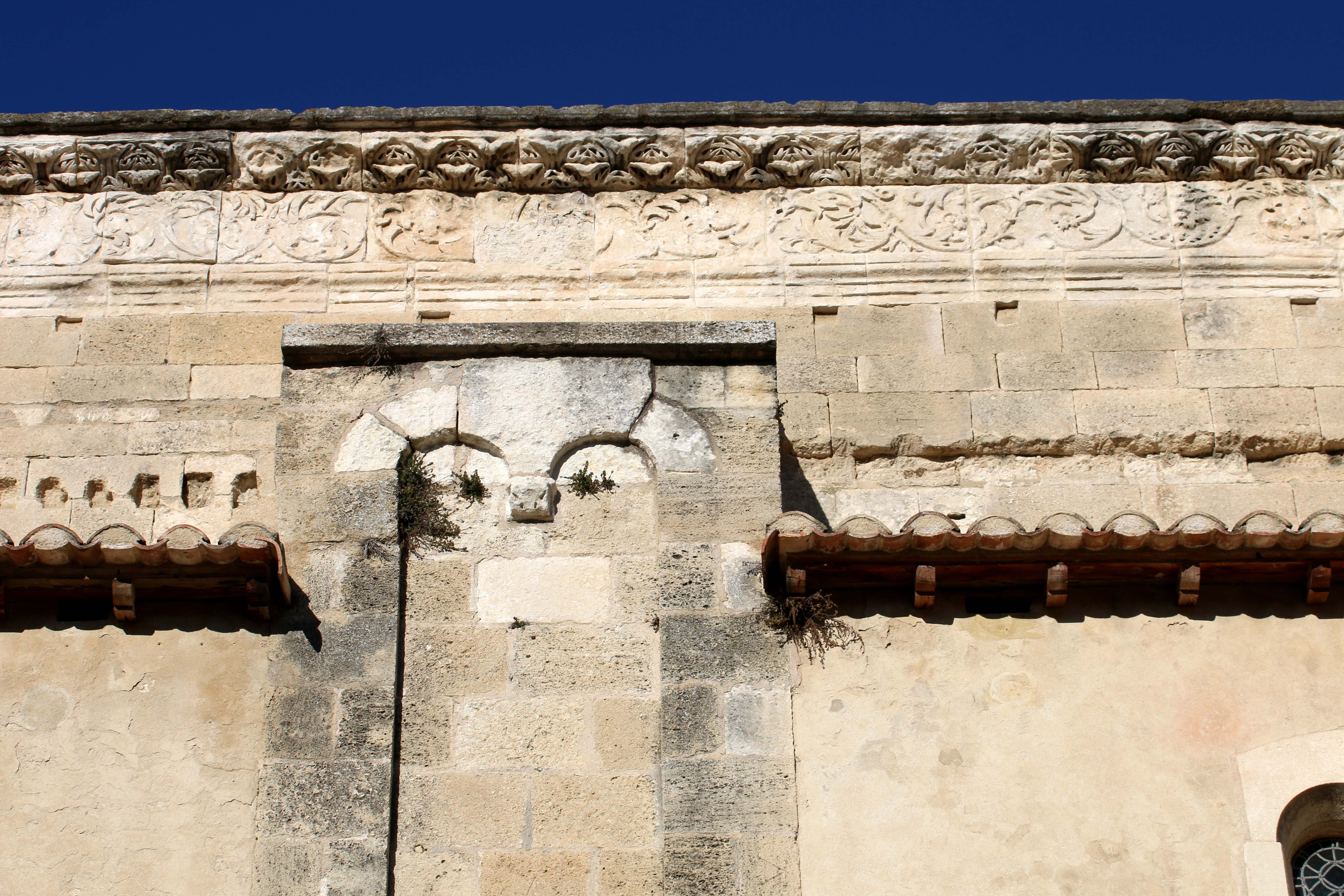 Détail d'un pilier et de la frise sur le mur sud de la cathédrale de Cavaillon